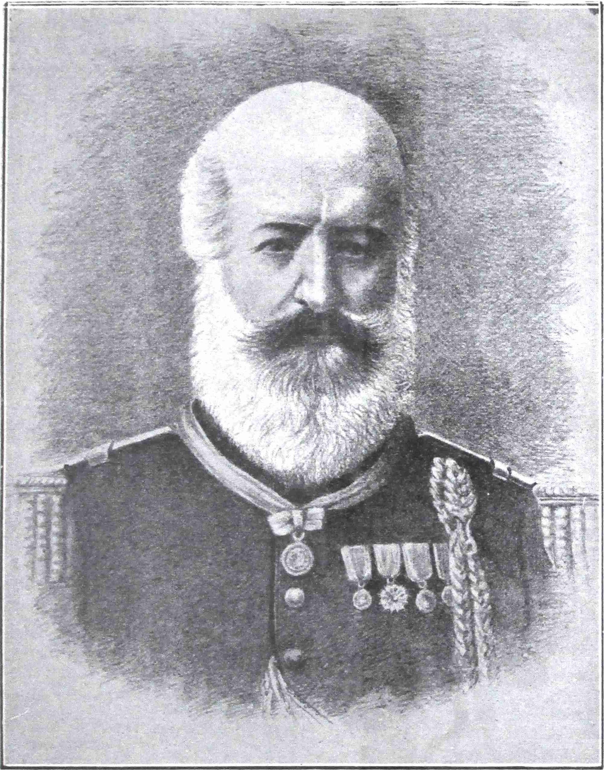 Coronel D. JOSÉ SEGUNDO ROCA.